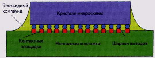 Монтаж кристалла микросхемы, выполненный по технологии flip chip